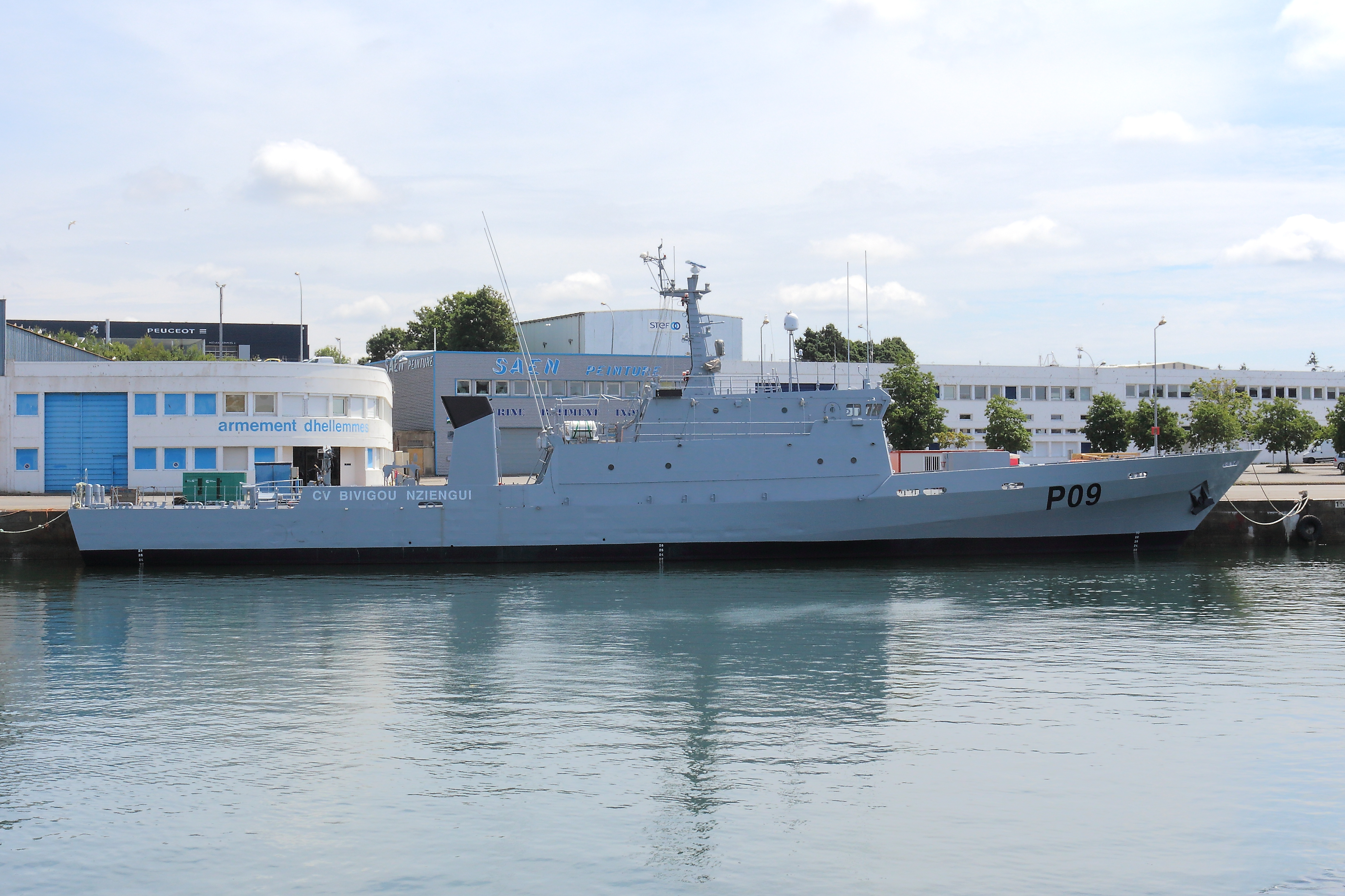 Le patrouilleur CV Bivigou Nziengui (ex Tapageuse de la Marine française) à quai à Concarneau avant sa livraison à la marine gabonaise. Concarneau, Finistère, Bretagne, France.